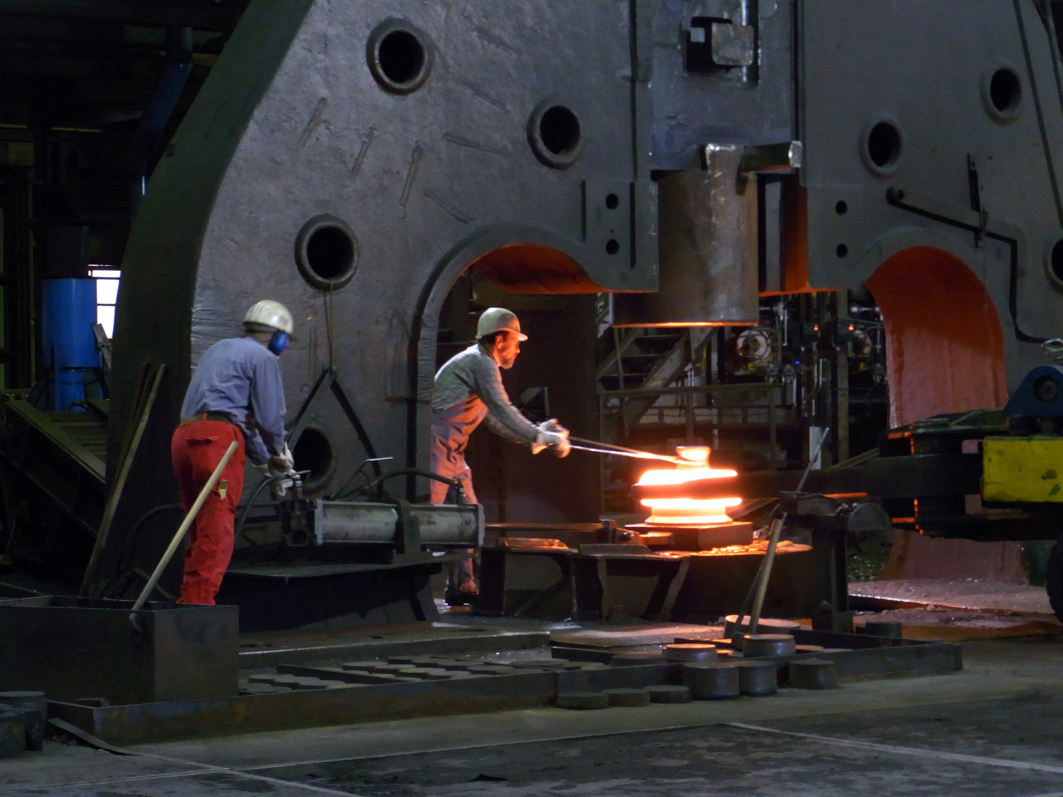 ExtraSchicht 2010 Radreifenproduktion im Bochumer Verein